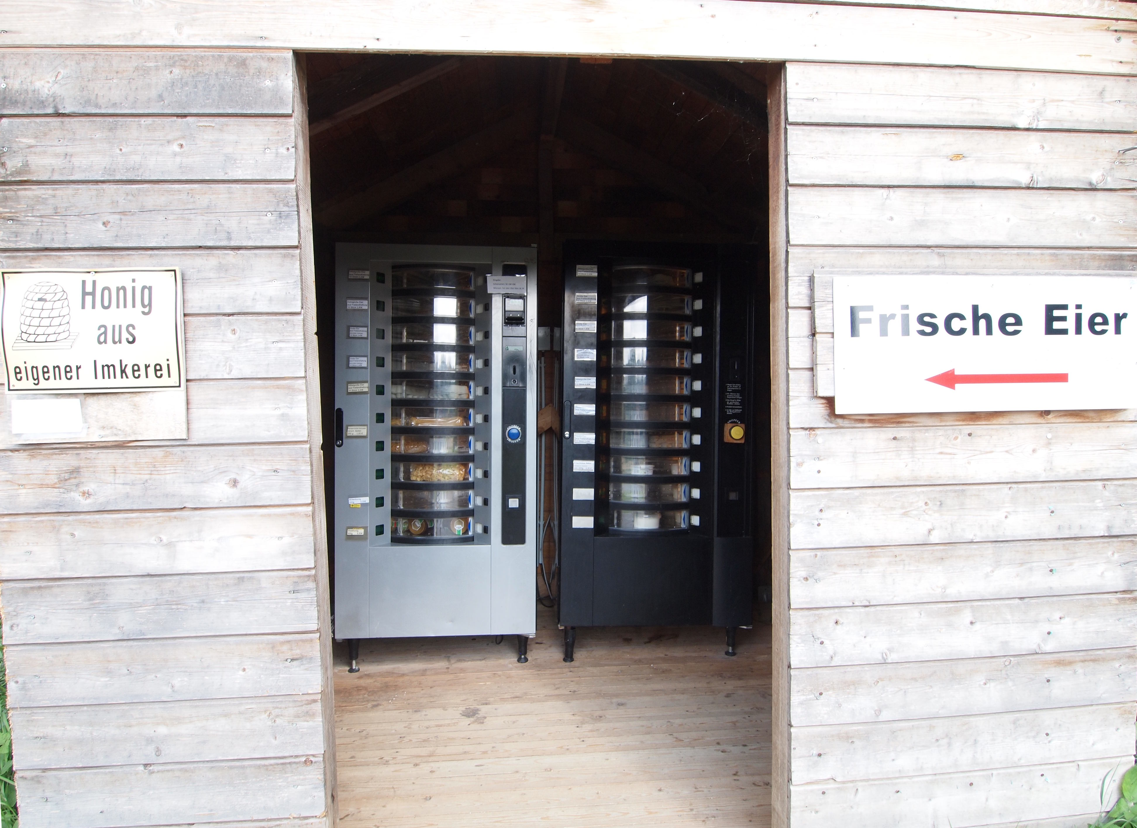 Verkaufsautomaten für Eier bei einem Hofladen